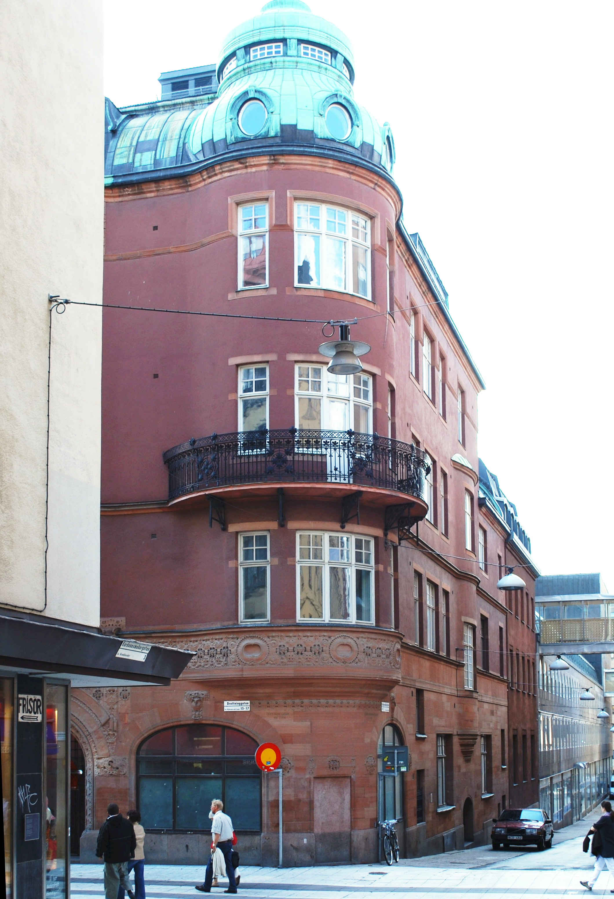 Sundsvalls Handelsbank, Drottninggatan 17